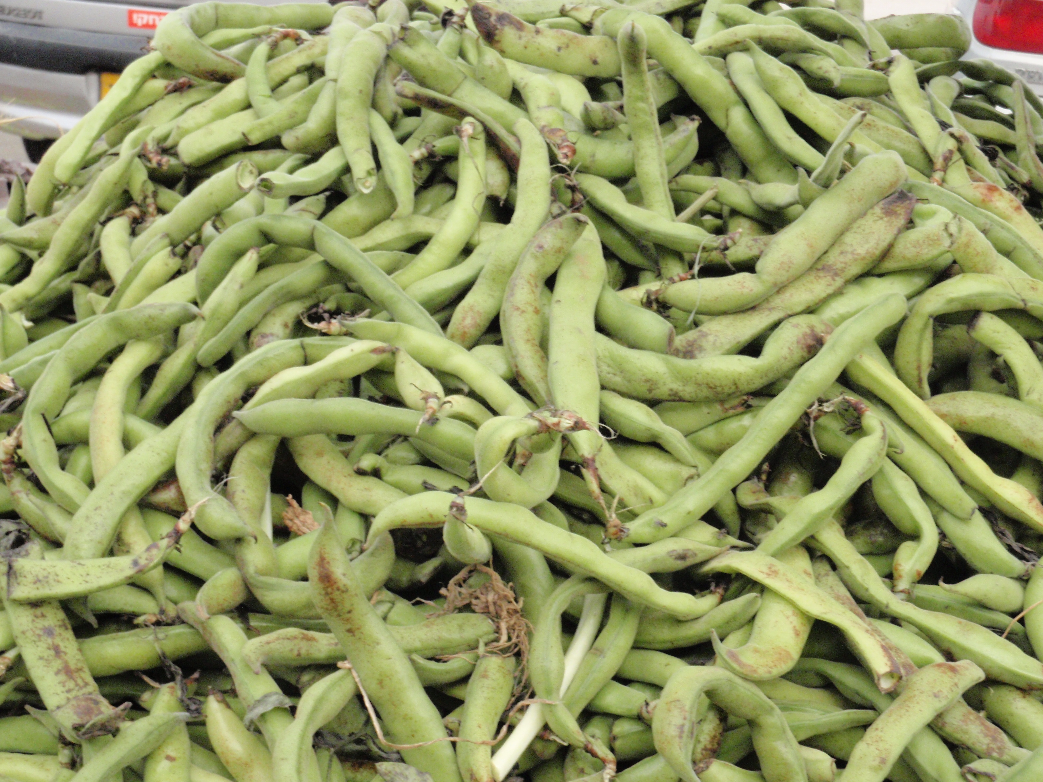 Shuk Hsayarim ירקות בשוק הסיירים Poole at Sayarim-Marcet